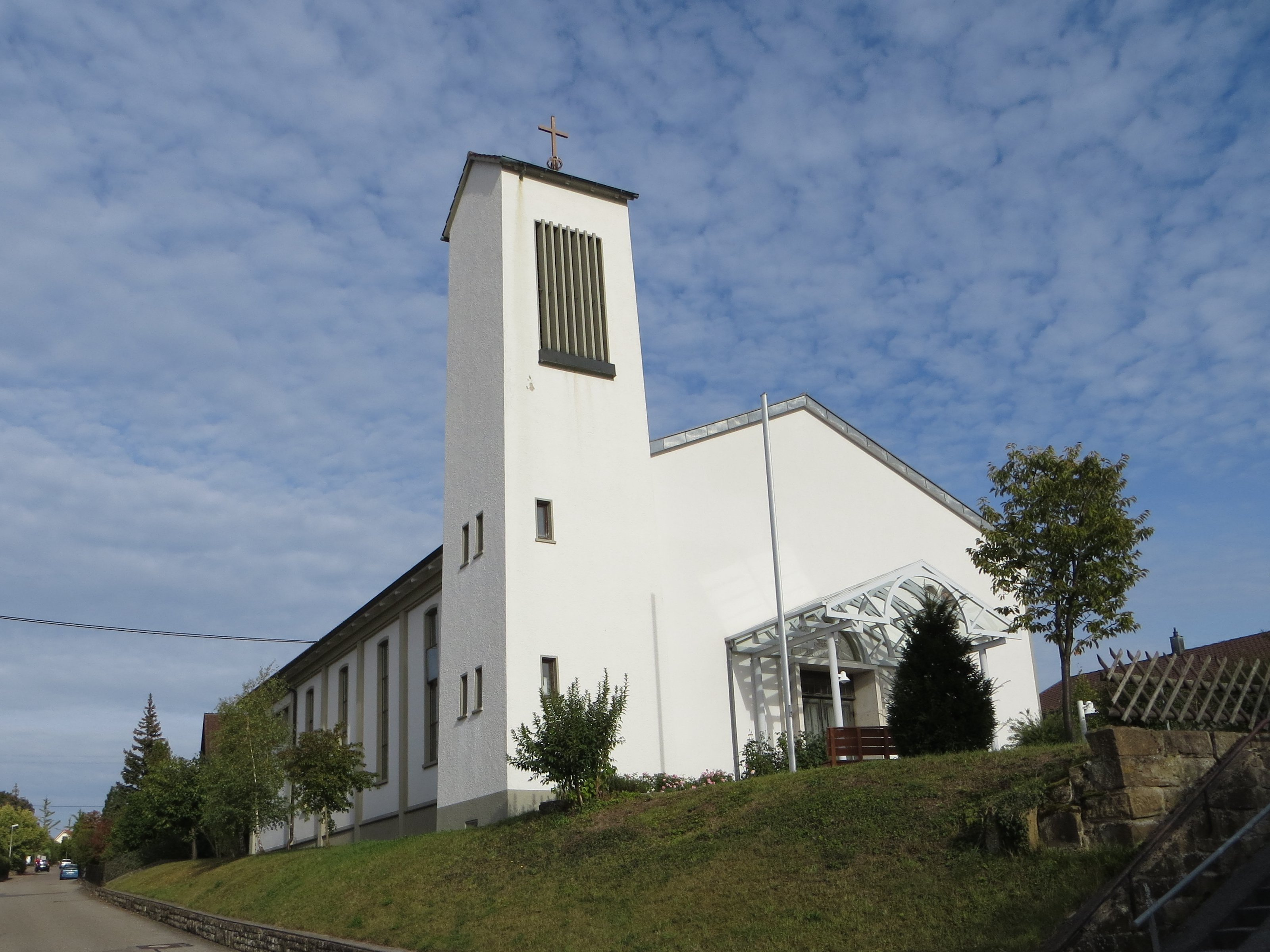 Die katholische Christus-König-Kirche in Brackenheim